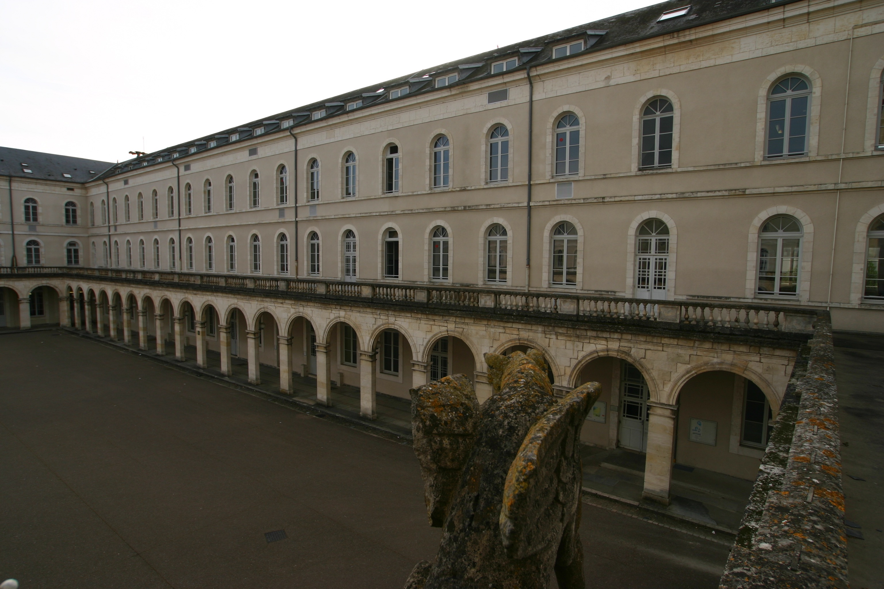 Façade du Bâtiment C du lycée [Jacques Cœur], [Bourges], [France]